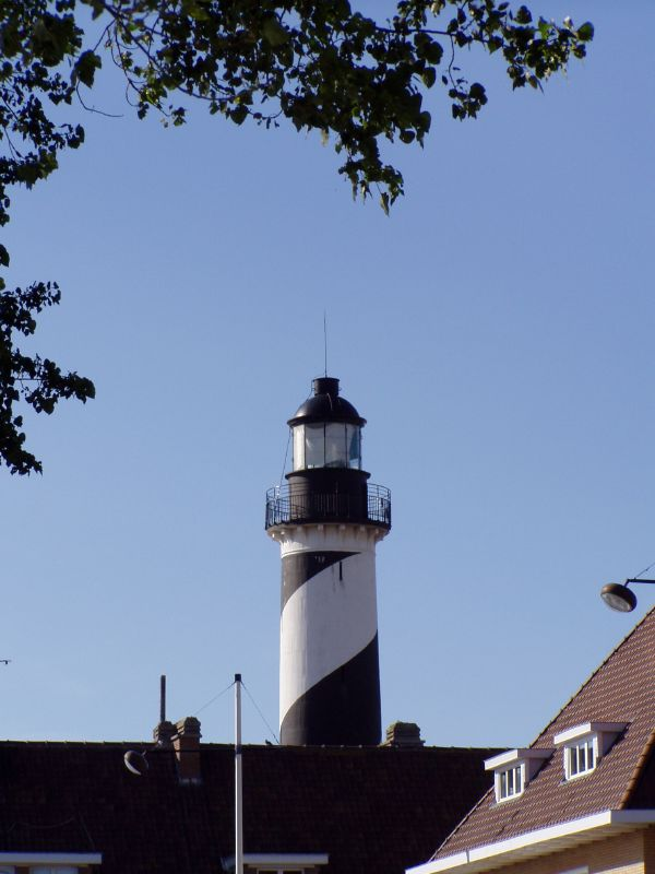 Phare de Petit-Fort-Philippe